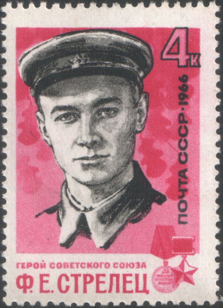 Почтовая марка СССР - Стрелец Фёдор Евдокимович, Герой Советского Союза